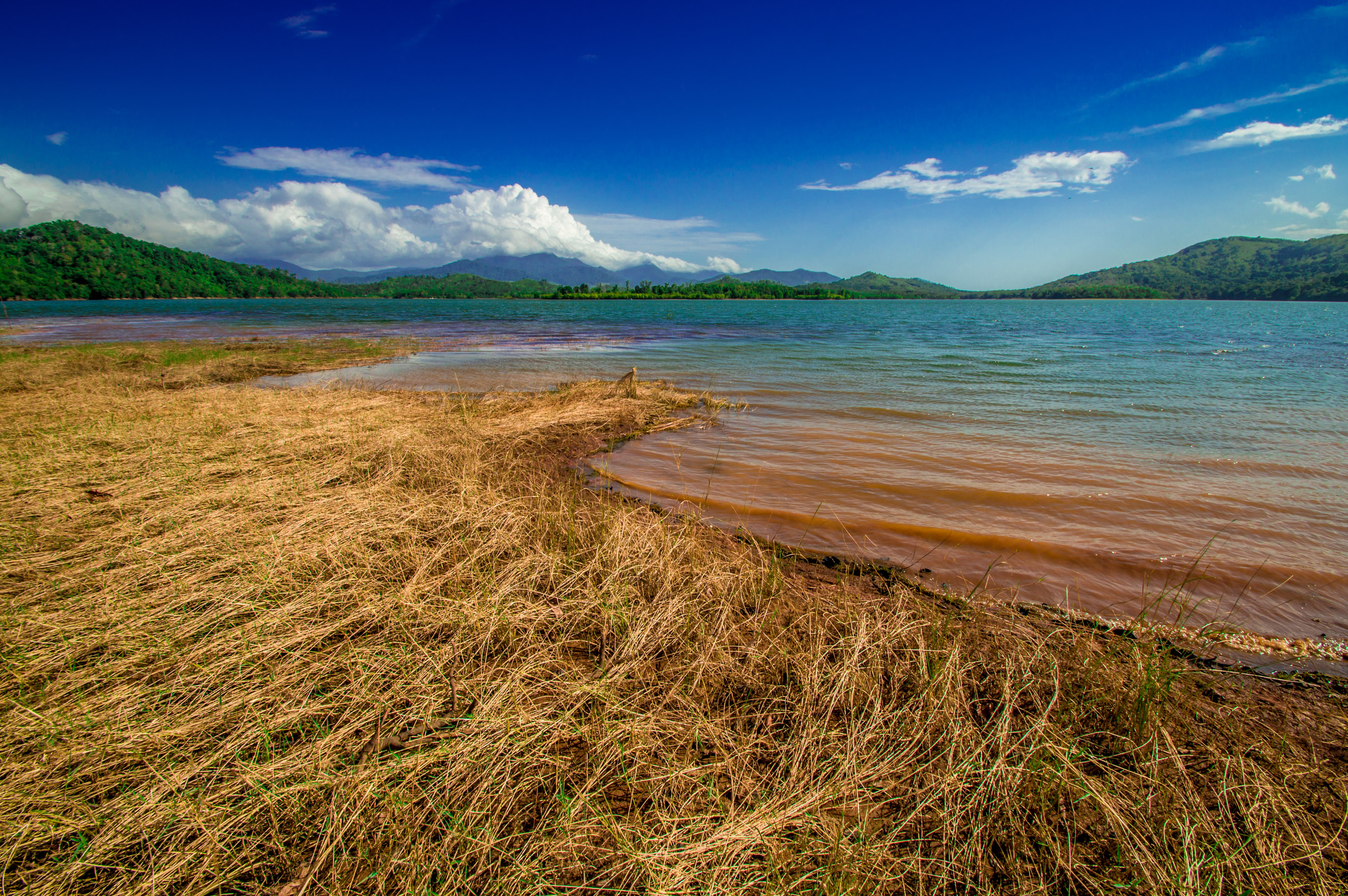 Indahnya pemanangan salah satu pulau yang berada di Waduk Riam Kanan